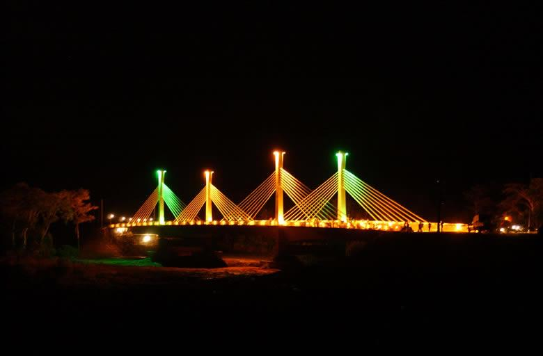 Ponte da Integração Brasil-Peru